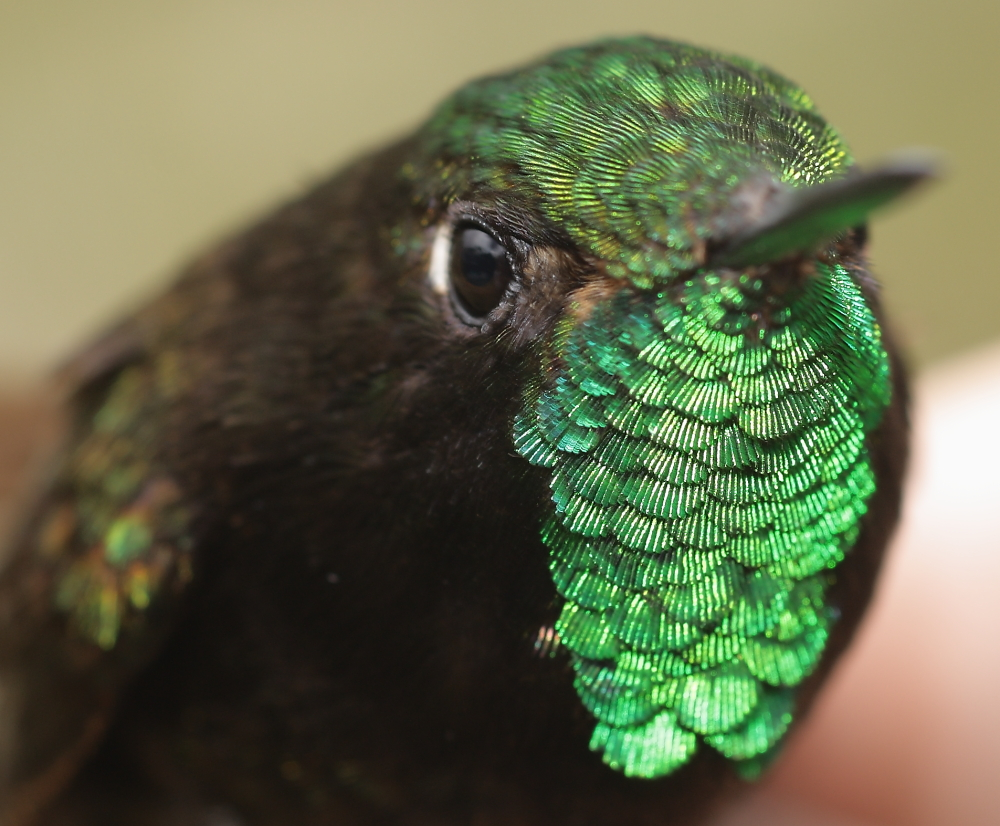 Metallura iracunda Birds of Serranía de Perijá of Colombia and Venezuela (Ornitologia Colombiana [2014] 14: 62–93)